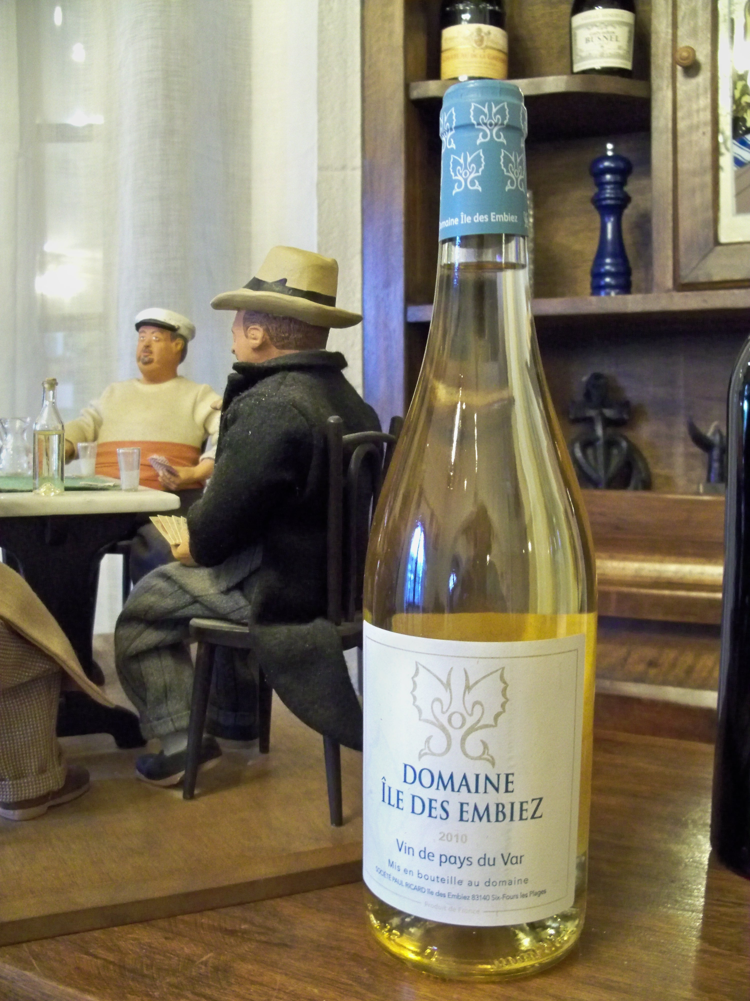 Bouteille de Domaine des Embiez, côte de Provence